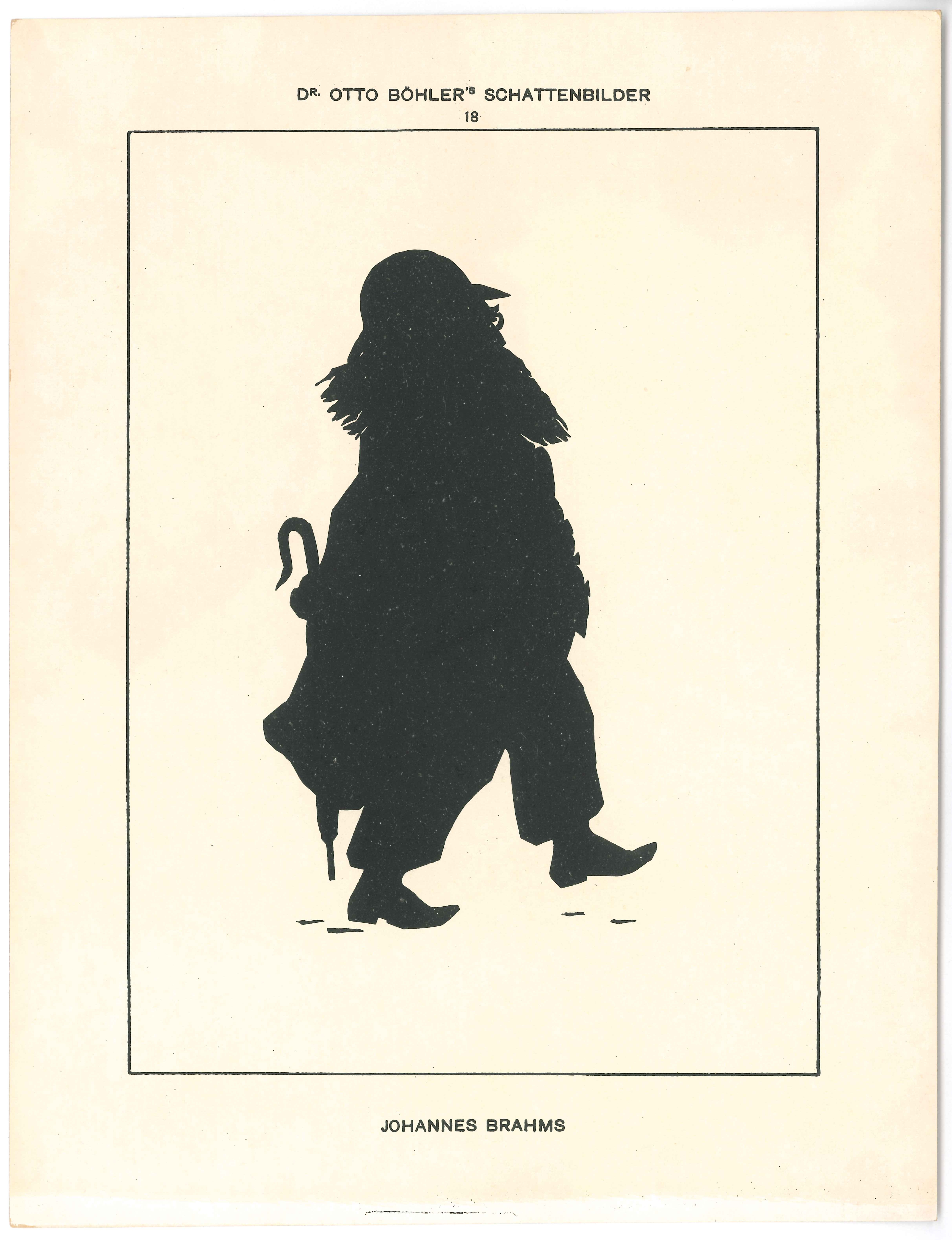 Johannes Brahms, Silhouette, 20 x 26 cm